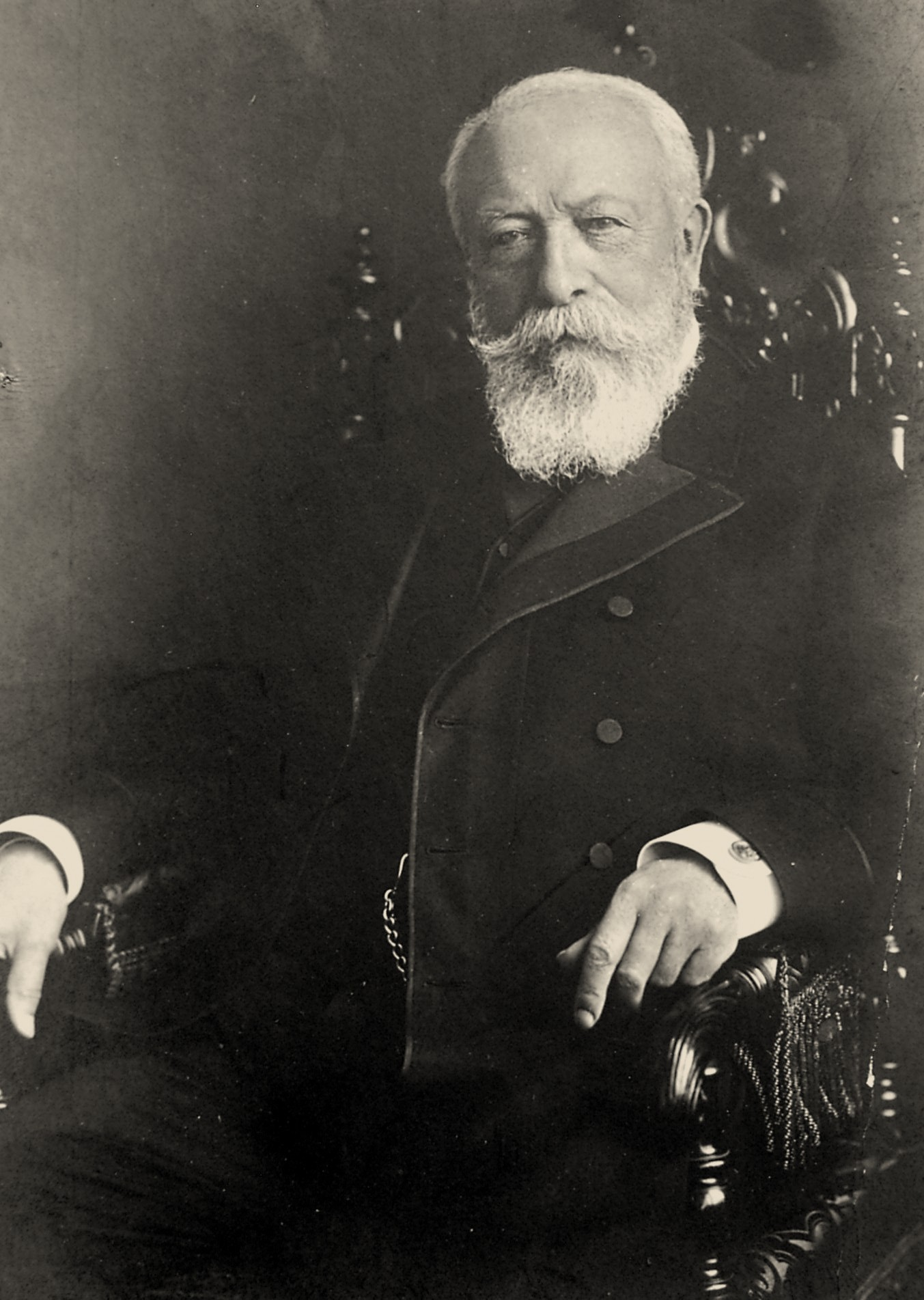 Großherzog Friedrich I. von Baden (1826–1907) in Zivil. Der Großherzog trägt einen dunklen zweireihigen Gehrock.